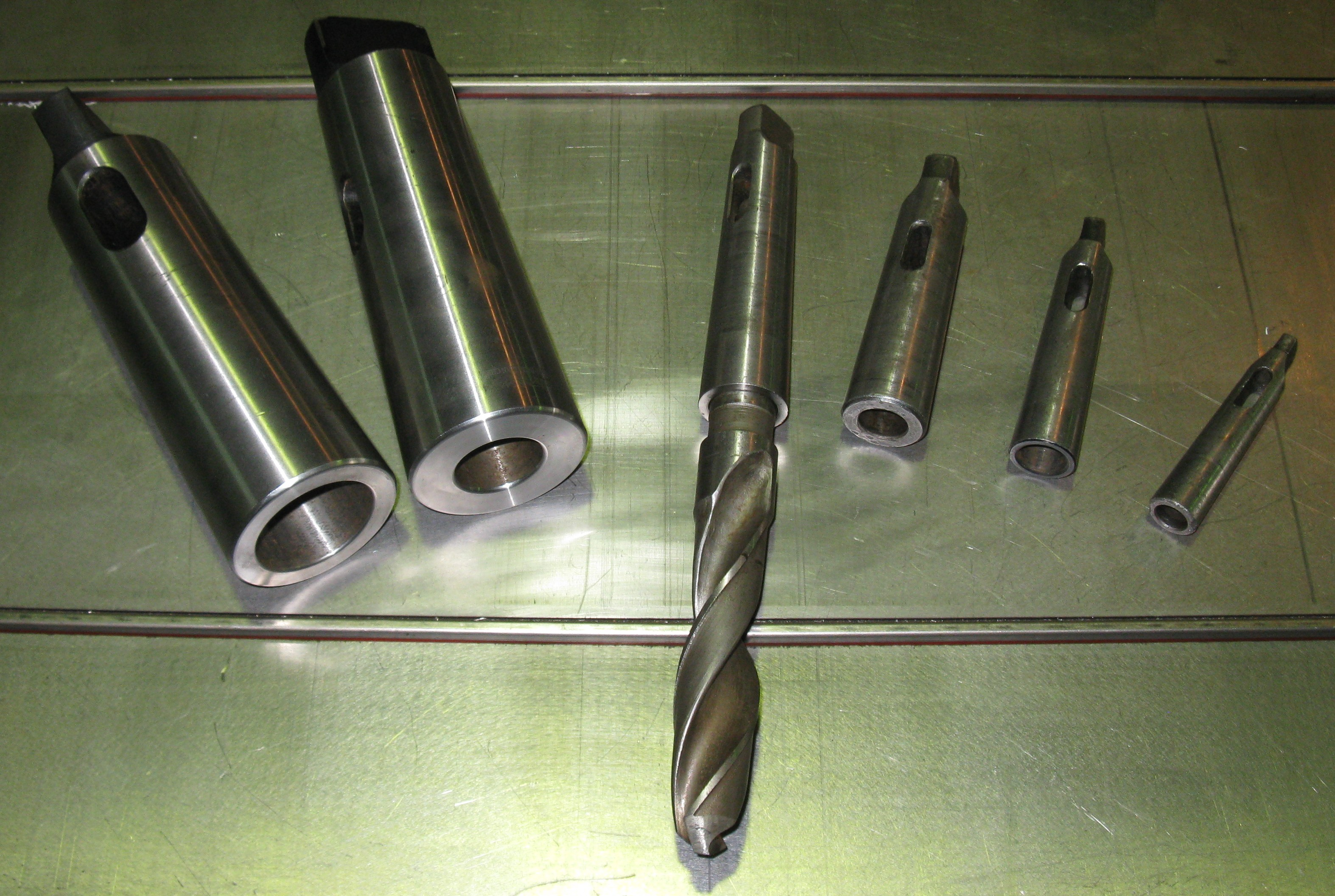 Переходные хвостовики сверла